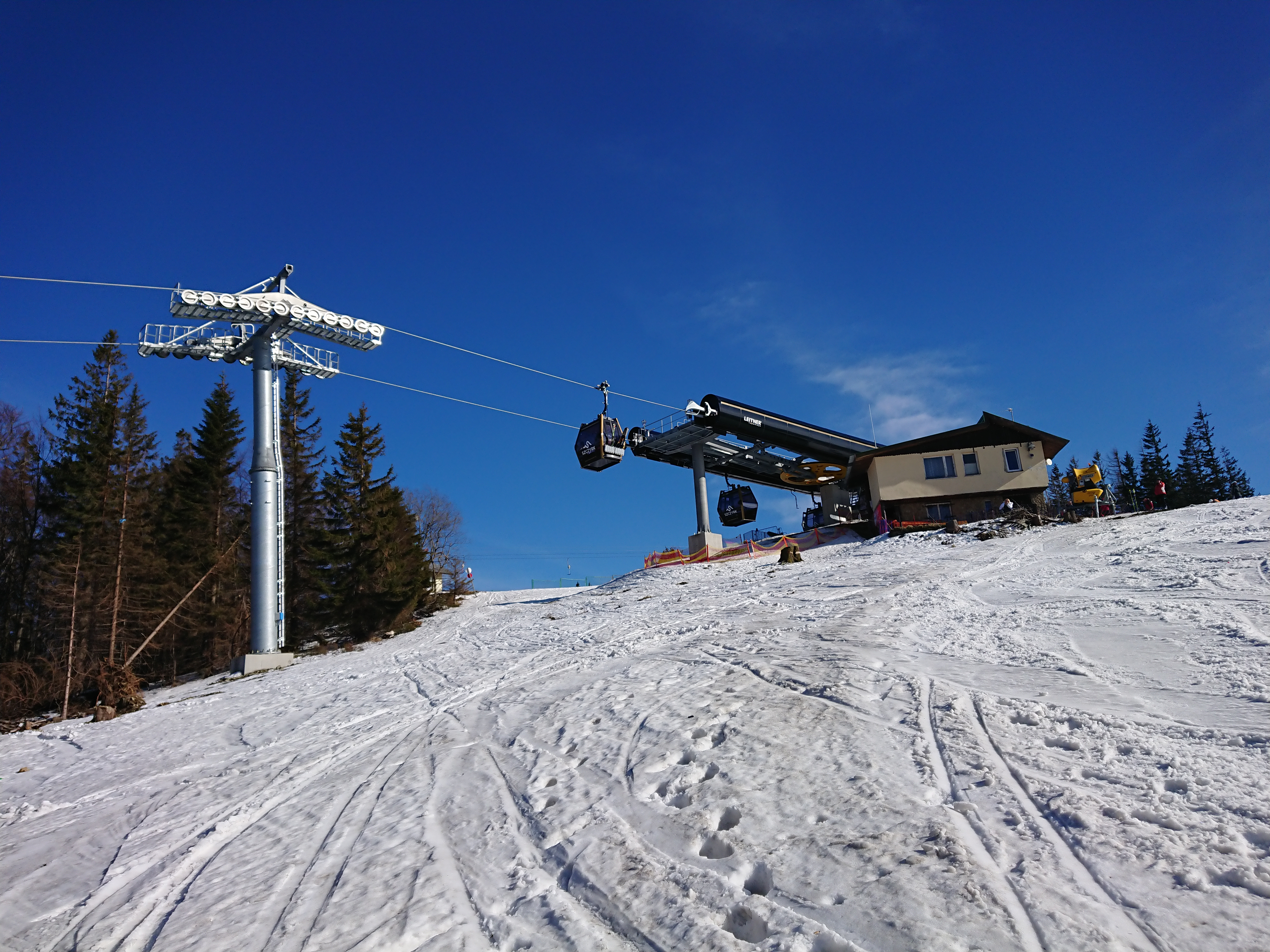 Górna stacja kolei gondolowej A1 na Hali Skrzyczeńskiej